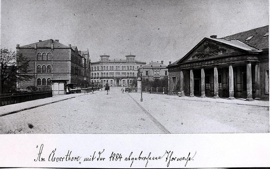 Fotografie (Reproduktion) aus der Zeit vor 1884: Blick über die Clevertor-Brücke mit der rechts davor stehenden, um 1790 im Sti des Klassizismus erbauten Clevertor-Wache ...